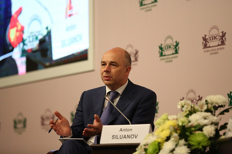 МБК-2015